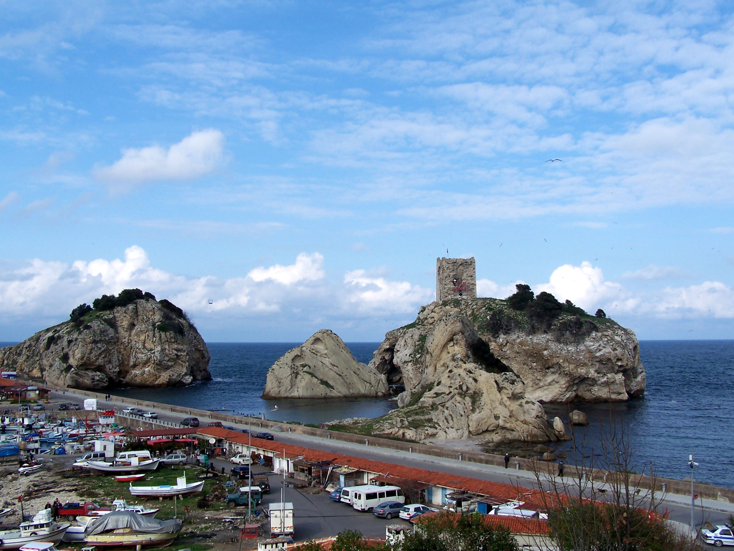 Şile Castle in Şile, Turkey